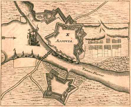 Город Азов